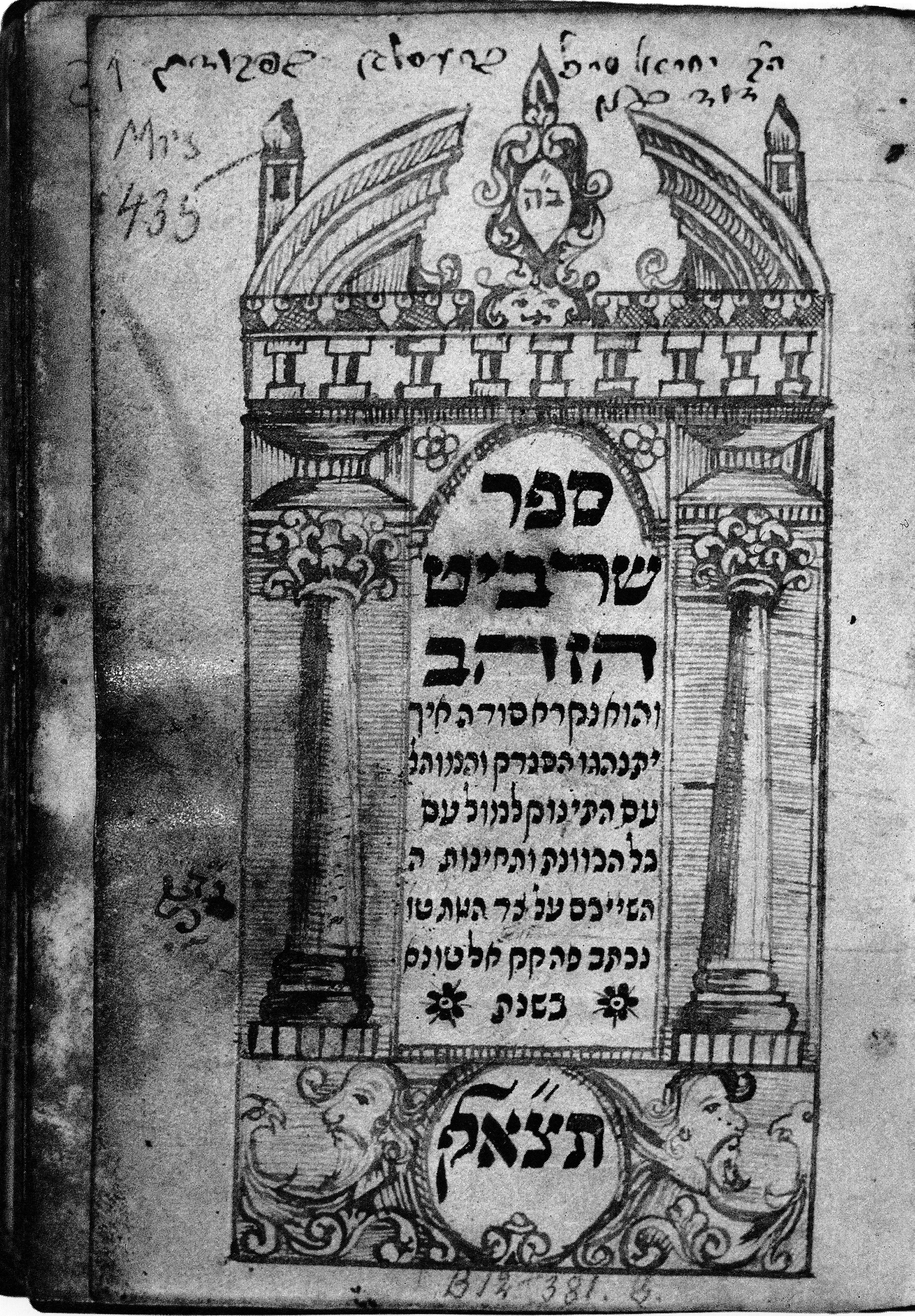 Mohelbuch des westfälischen Landesrabbiners Michael Meyer Breslau (siehe Jüdische Gemeinde Warendorf).